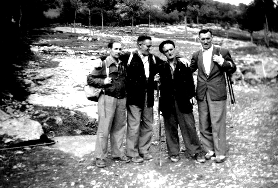 Juan San Martin, Carlos Linazasoro, Indalecio Ojanguren eta Andres Espinosa, Ojangurenen omenaldi egunean. Arantzazu, Gipuzkoa. Euskal Herria. (Euskara) Juan San Martin, Carlos Linazasoro, Indalecio Ojanguren and Andres Espinosa, in homage to Ojanguren. Arantzazu, Gipuzkoa. Basque Country. (English)